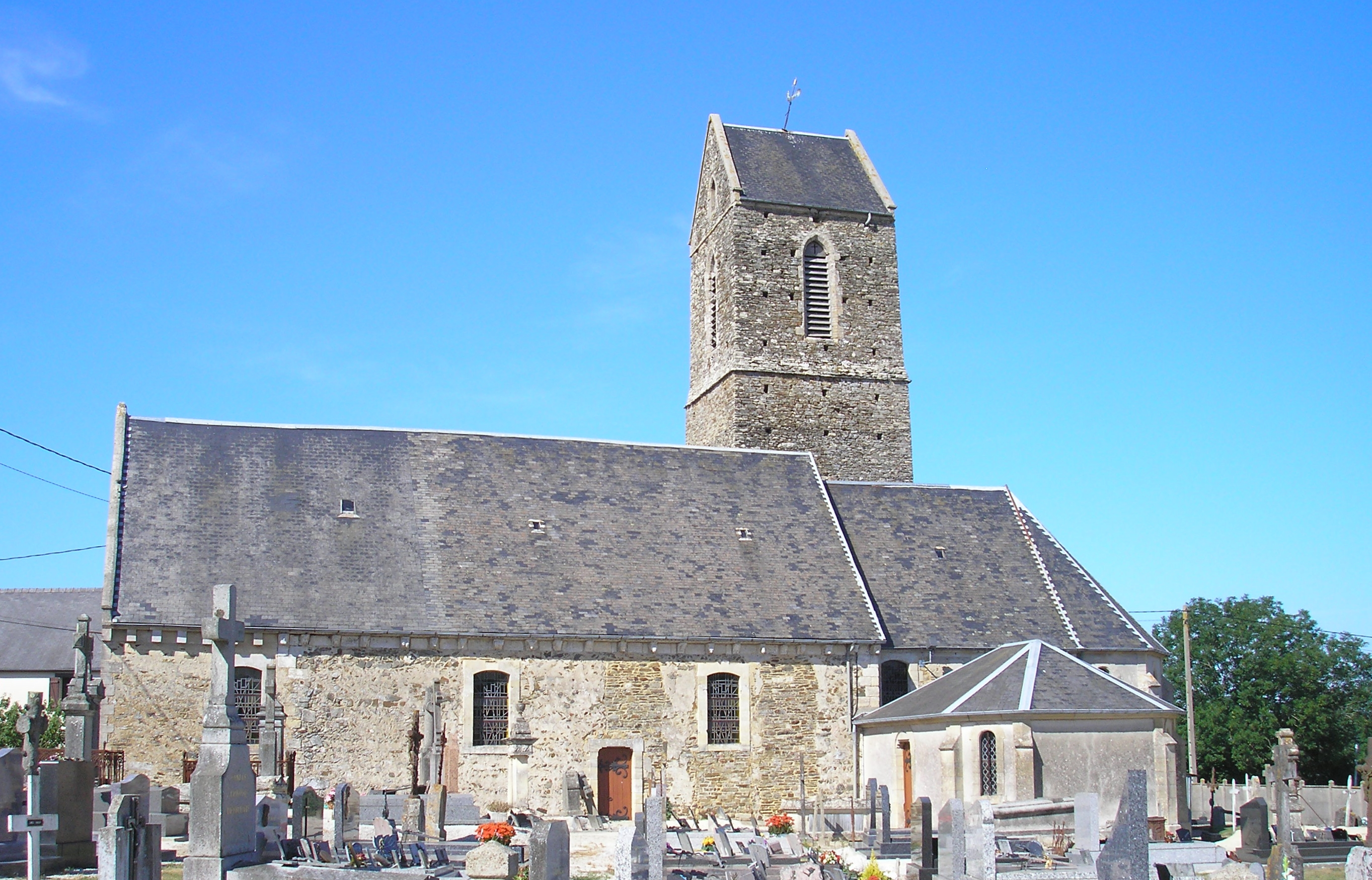 Sainte-Honorine-de-Ducy (Normandie, France). L'église Sainte-Honorine.